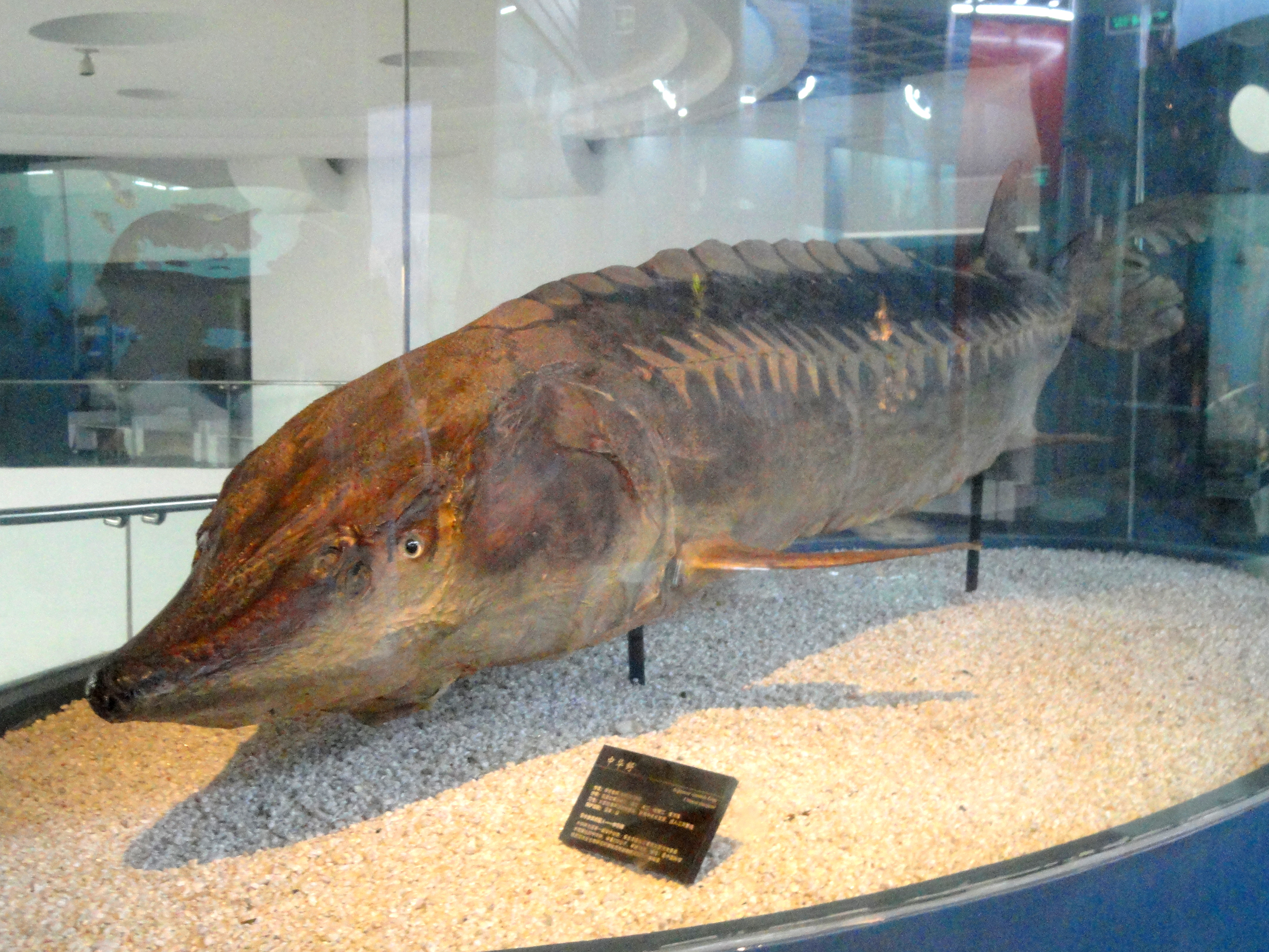 english : Exhibit in the Kunming Natural History Museum of Zoology (昆明动物博物馆), Kunming, Yunnan, China deutsch : Ausstellung im Kunming Naturhistorischen Museum der Zoologie, Kunming, Provinz Yunnan, China